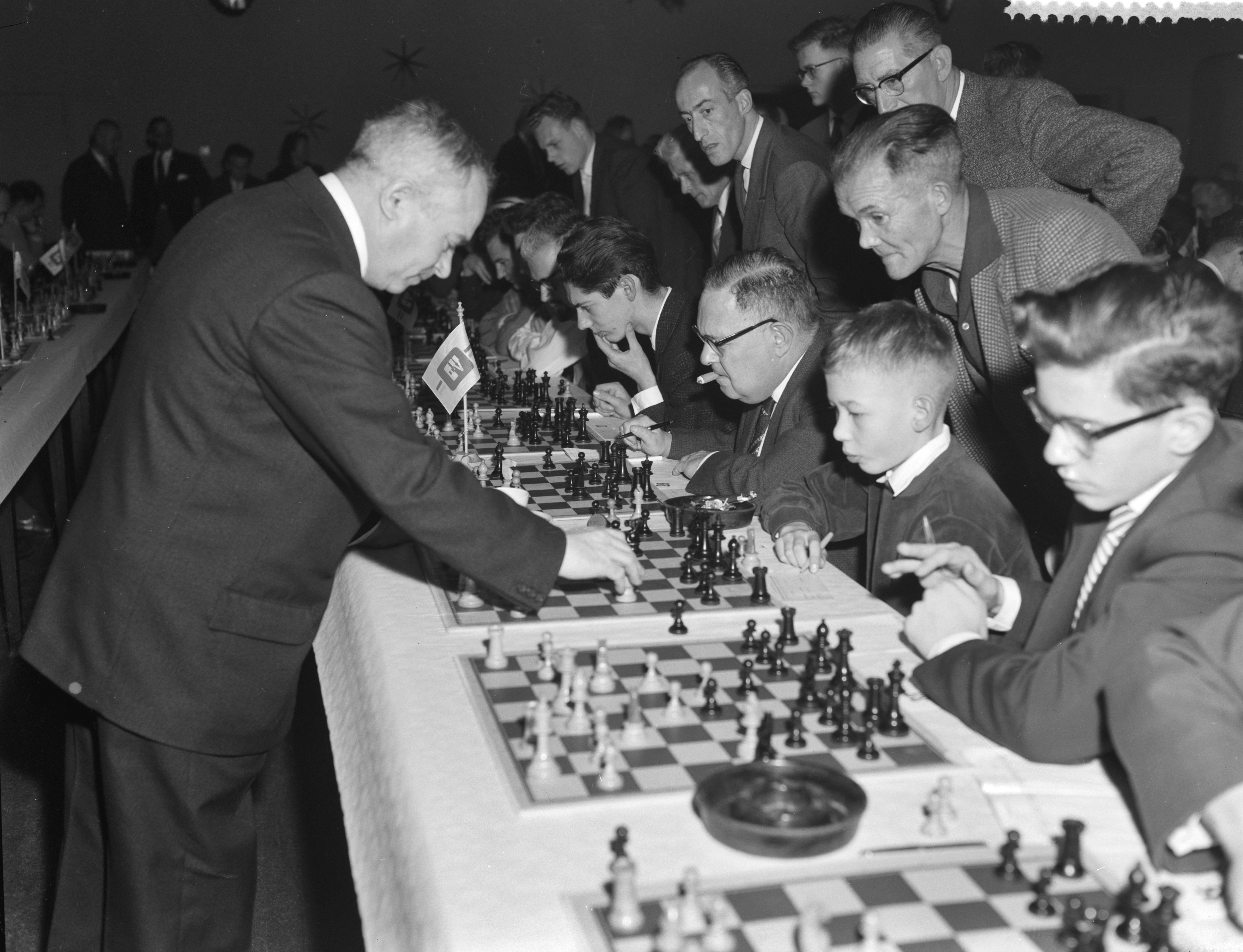 Collectie / Archief : Fotocollectie Anefo Reportage / Serie : [ onbekend ] Beschrijving : Russische schakers op simultaantoernooi te Hilversum Datum : 27 december 1959 Locatie : Hilversum Trefwoorden : schakers, simultaantoernooien Fotograaf : Rossem, Wim van / Anefo Auteursrechthebbende : Nationaal Archief Materiaalsoort : Negatief (zwart/wit) Nummer archiefinventaris : bekijk toegang 2.24.01.04 Bestanddeelnummer : 910-8987